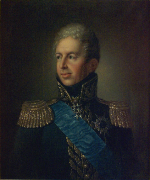 Porträtt av fältmarskalken Johan August Sandels, målat av Per Krafft den yngre. 1830- 40-tal.